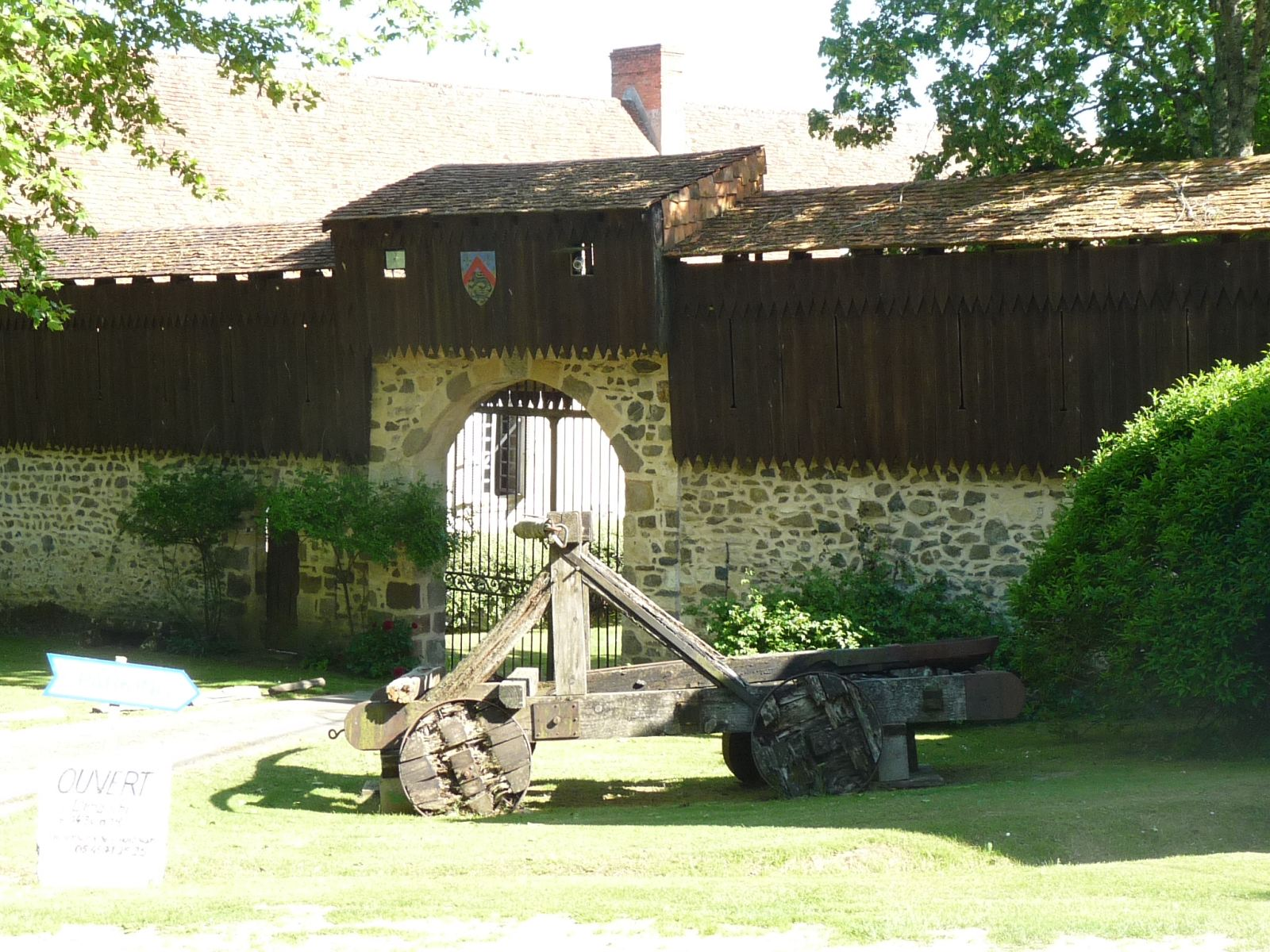 Entrée du château de Peyras, à Roumazières, Charente, France